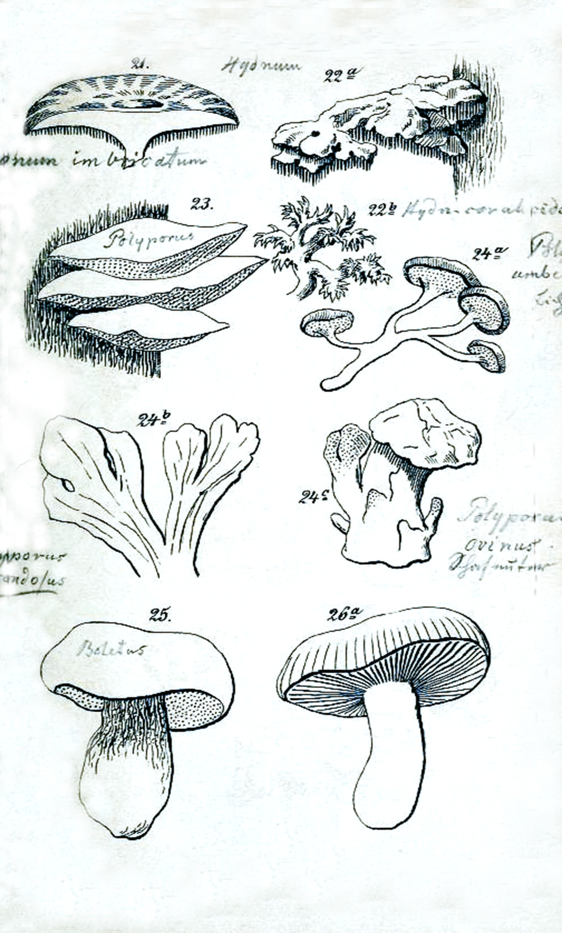 Der Führer in die Pilzkunde: Anleitung zum methodischen, leichten und sicheren Bestimmen der in Deutschland vorkommenden Pilze mit Ausnahme der Schimmel- und allzu winzigen Schleim- und Kern-Pilzchen” (Ghid pentru știința micologiei, fără ciupercuțe de mucegai și prea mici mucoase și nucleici), cu 80 de ilustrații litografice, Editura E. Luppe, Zerbst 1871, p. 149